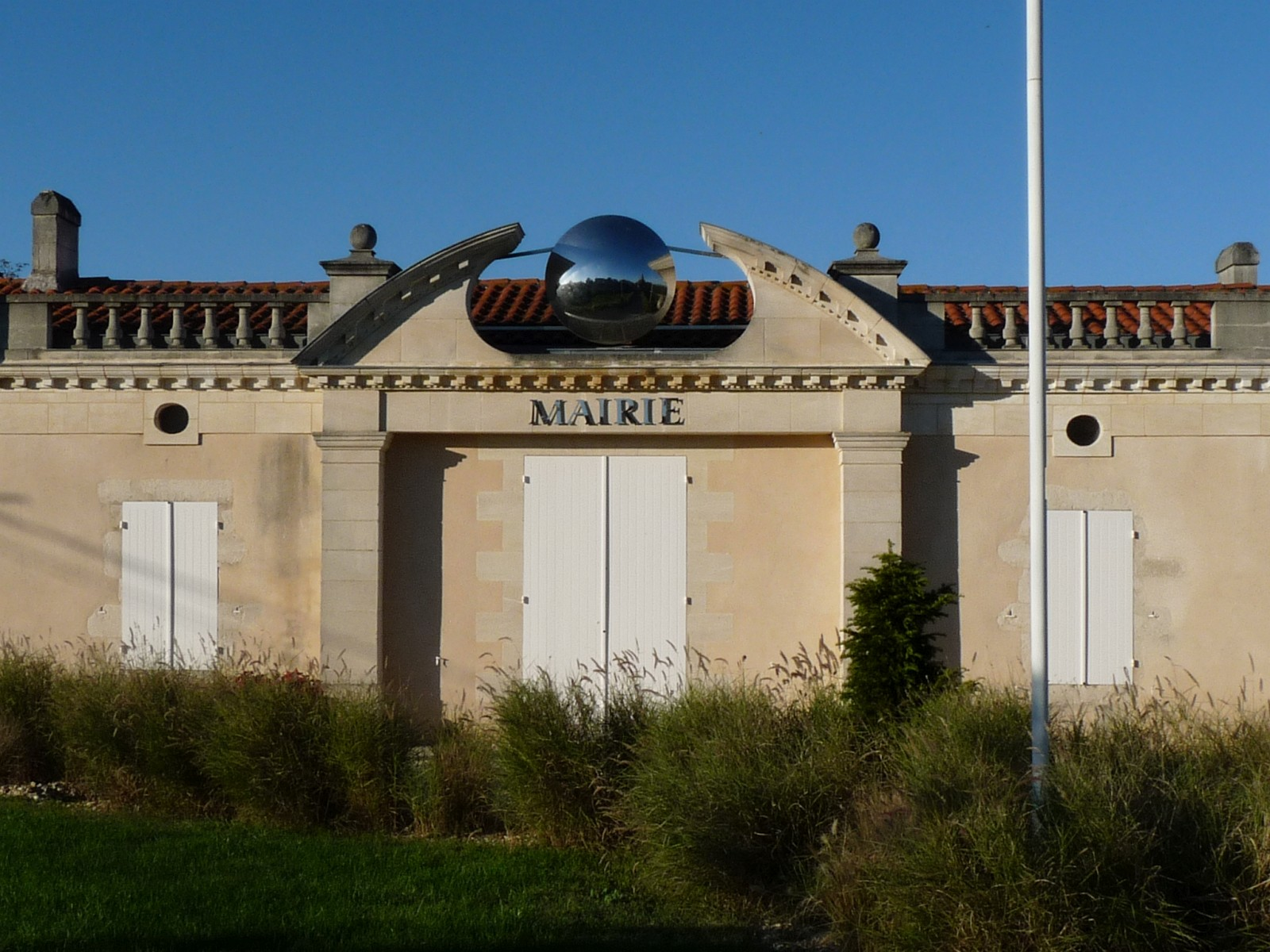 Mairie d'Eyrans, Gironde, France